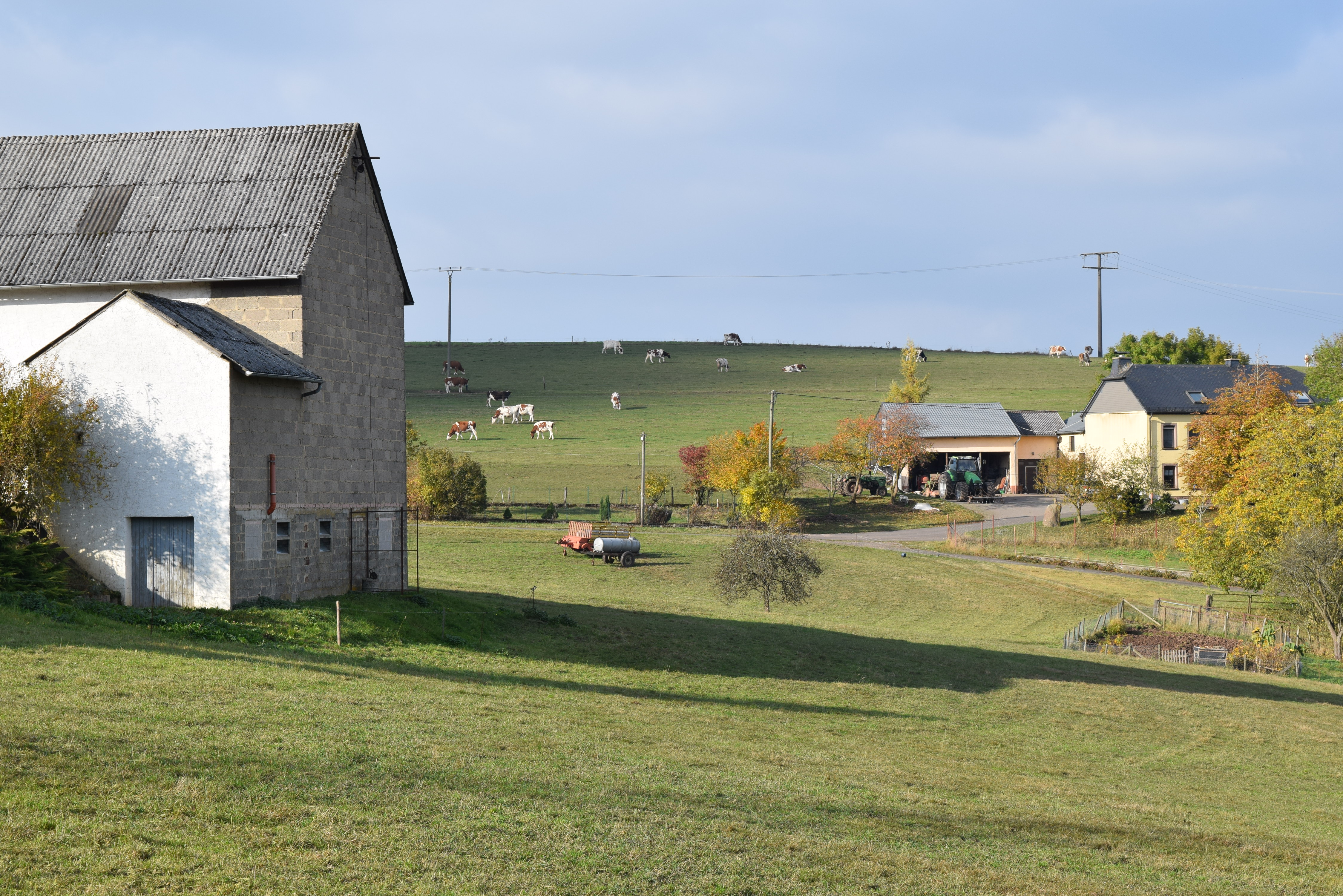 Geweberhof